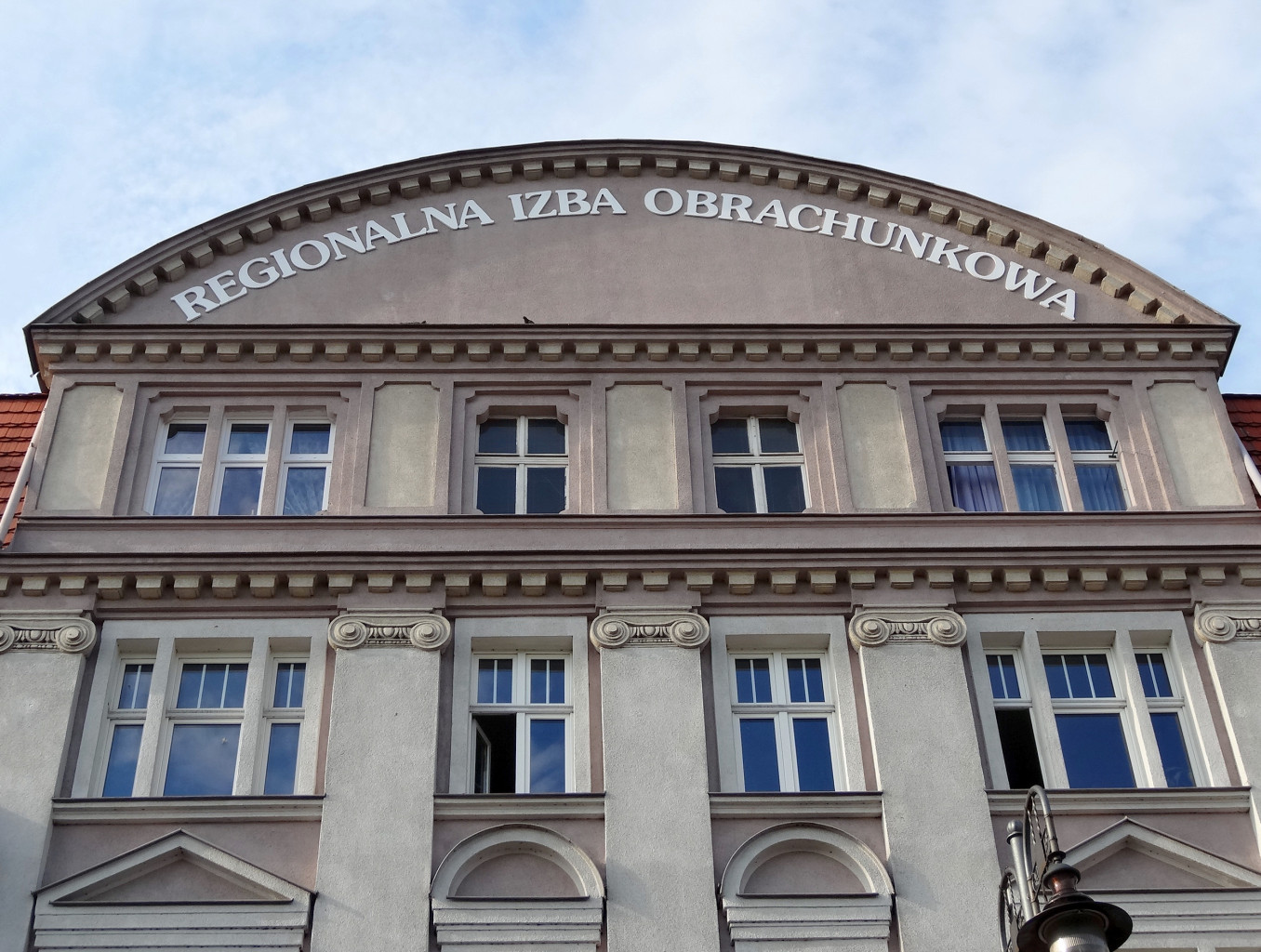 Kamienica przy ul. Świętej Trójcy 25 w Bydgoszczy (zbud. 1912), Regionalna Izba Obrachunkowa